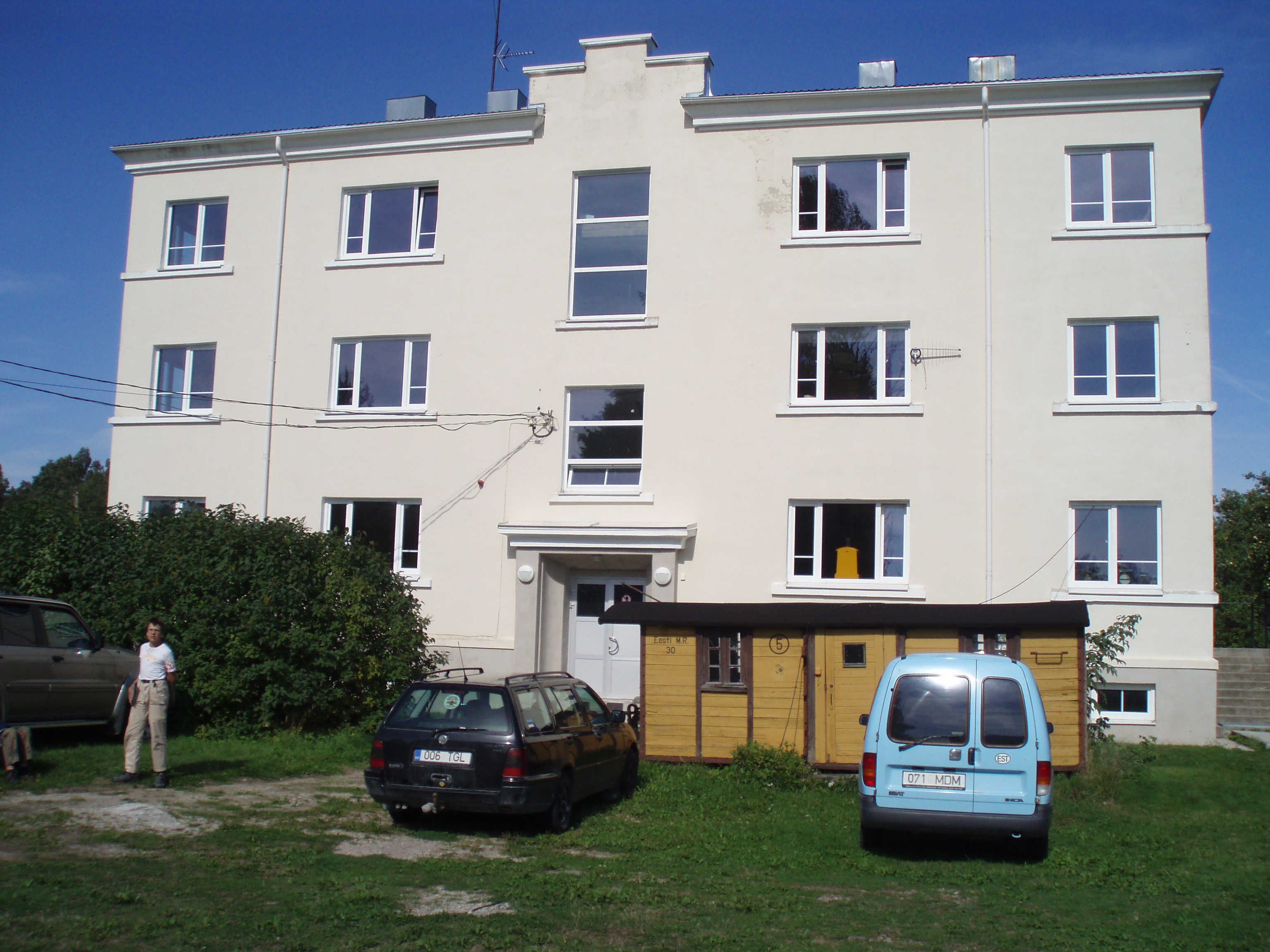 Muuseumi maja ja kontor